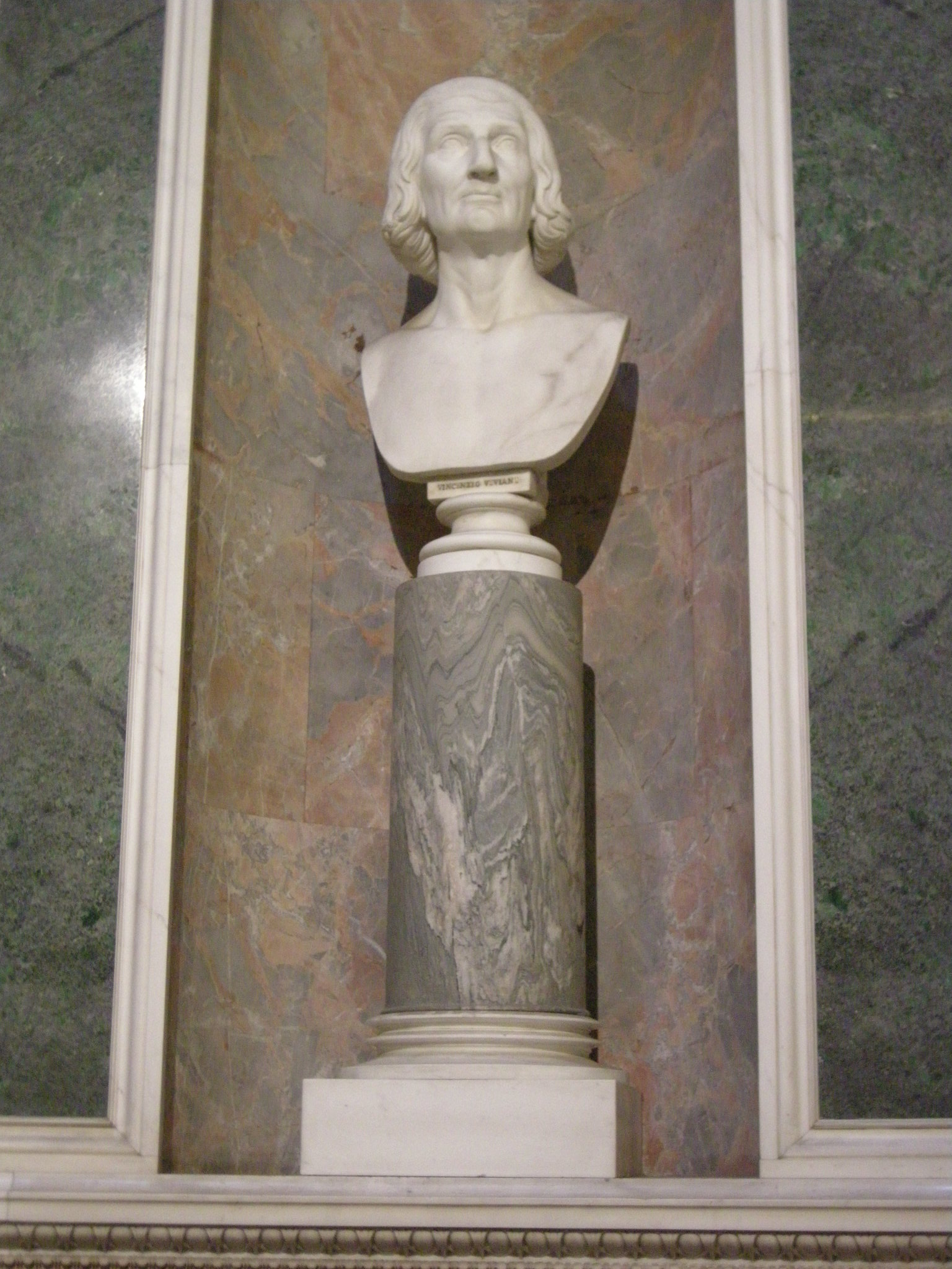 Tribuna di galileo, busto vincenzo viviani